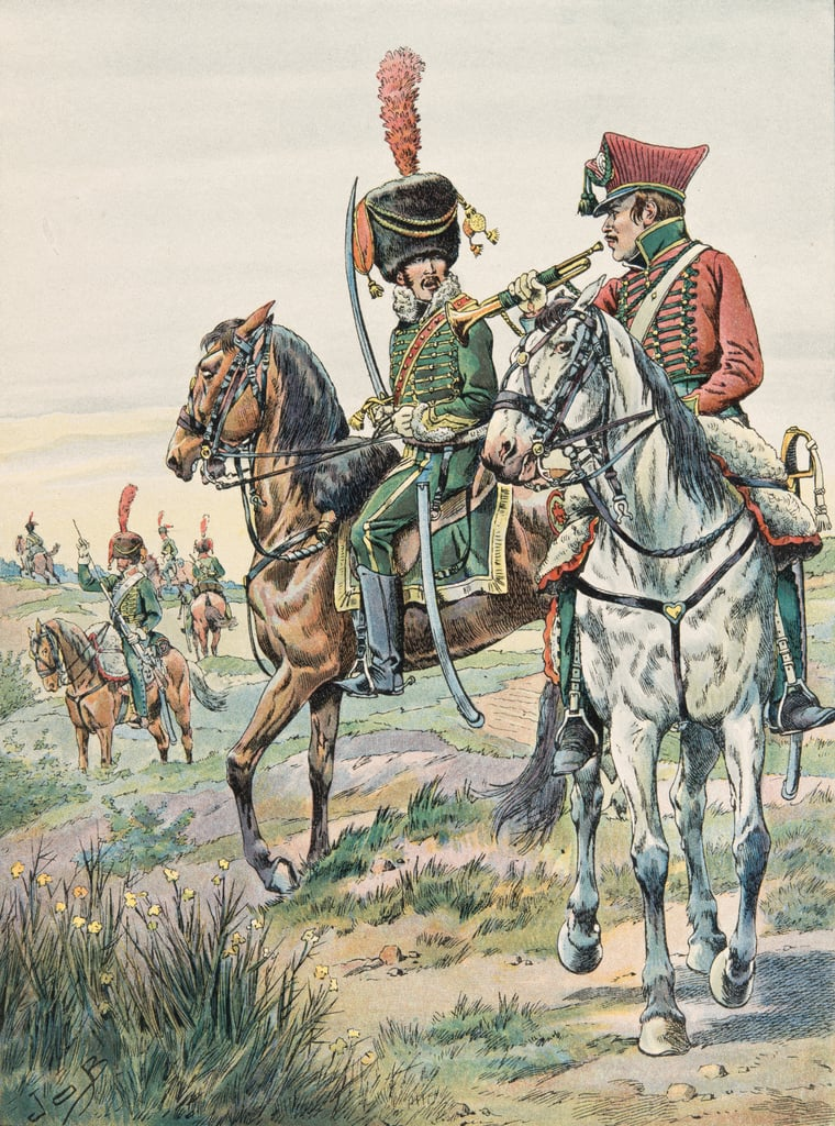 Compagnie d'élite des chevau-légers belges du duc d'Arenberg. Au centre, le capitaine de Wesner en discussion avec son trompette. Celui-ci porte la coiffure à la polonaise, très à la mode à l'époque.